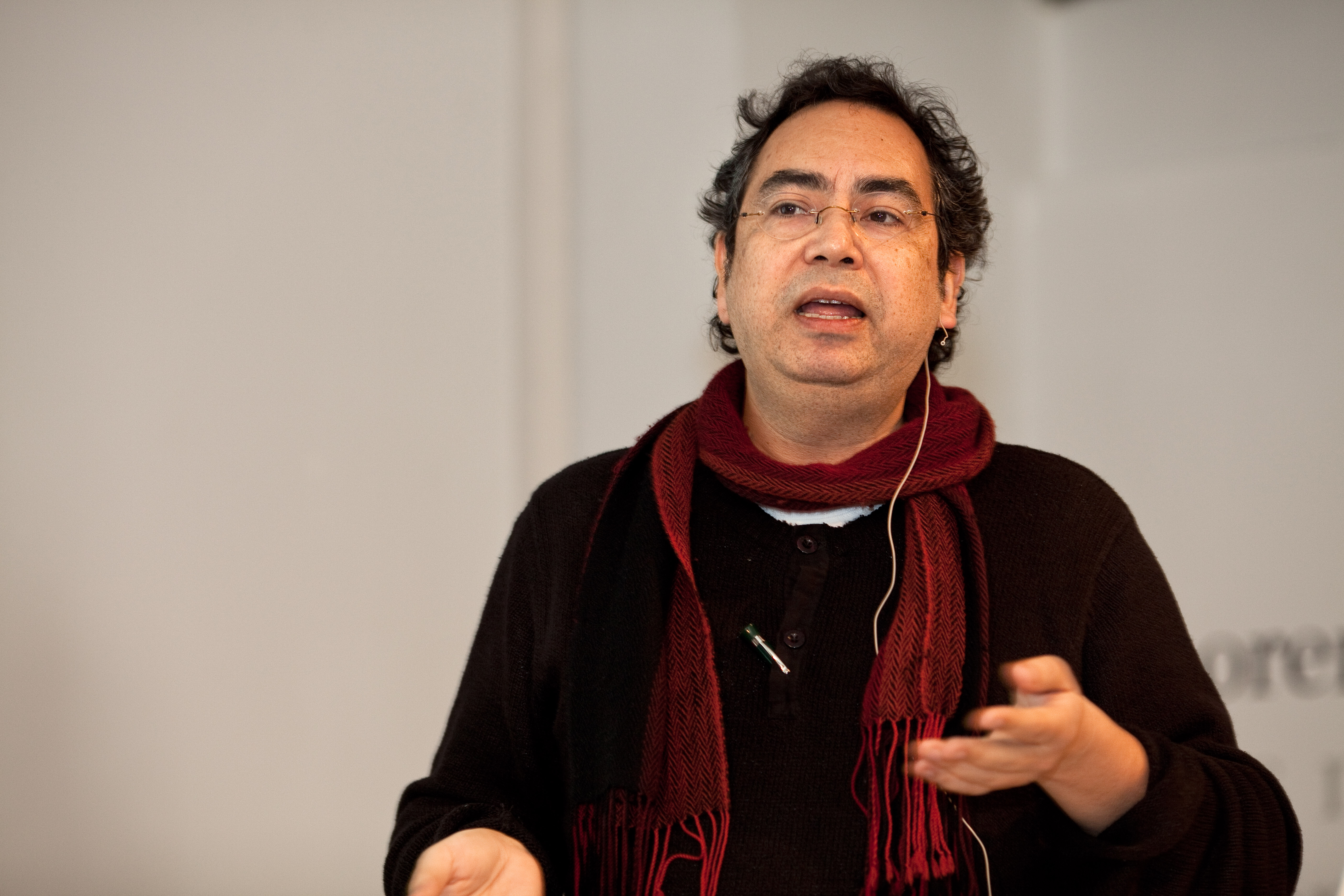 Fred Smeijers auf dem Webfontday der Typographischen Gesellschaft München (tgm).